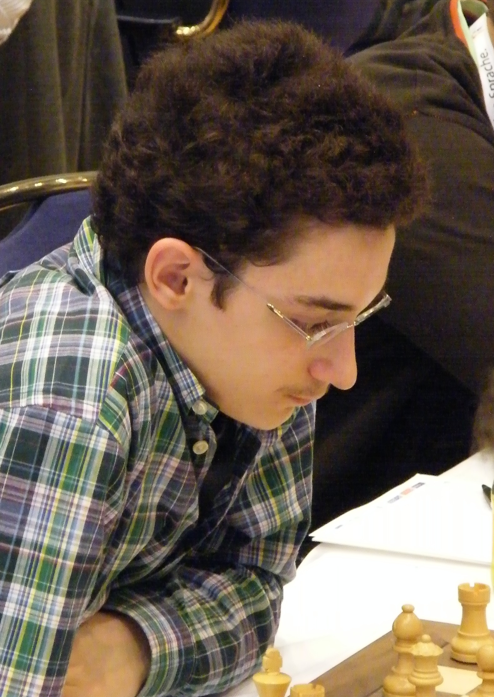 Fabiano Caruana bei der 38. Schacholympiade in Dresden 2008